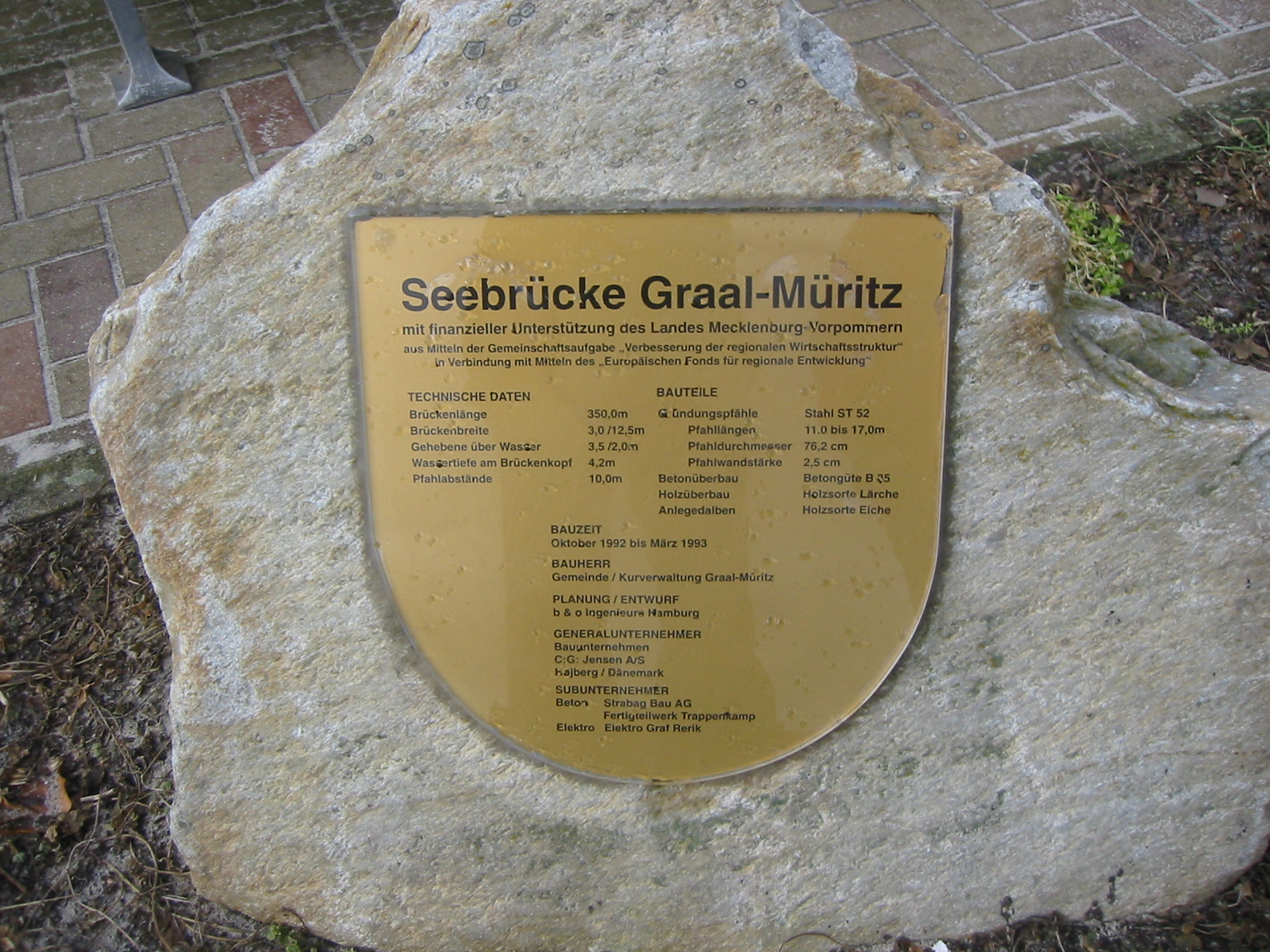 Findling an der im Seebrücke im Seeheilbad Graal-Müritz, einer amtsfreien Gemeinde im Landkreis Rostock in Mecklenburg-Vorpommern. Er zeigt technische Daten zur Entstehung sowie zu den Abmessungen der Seebrücke.